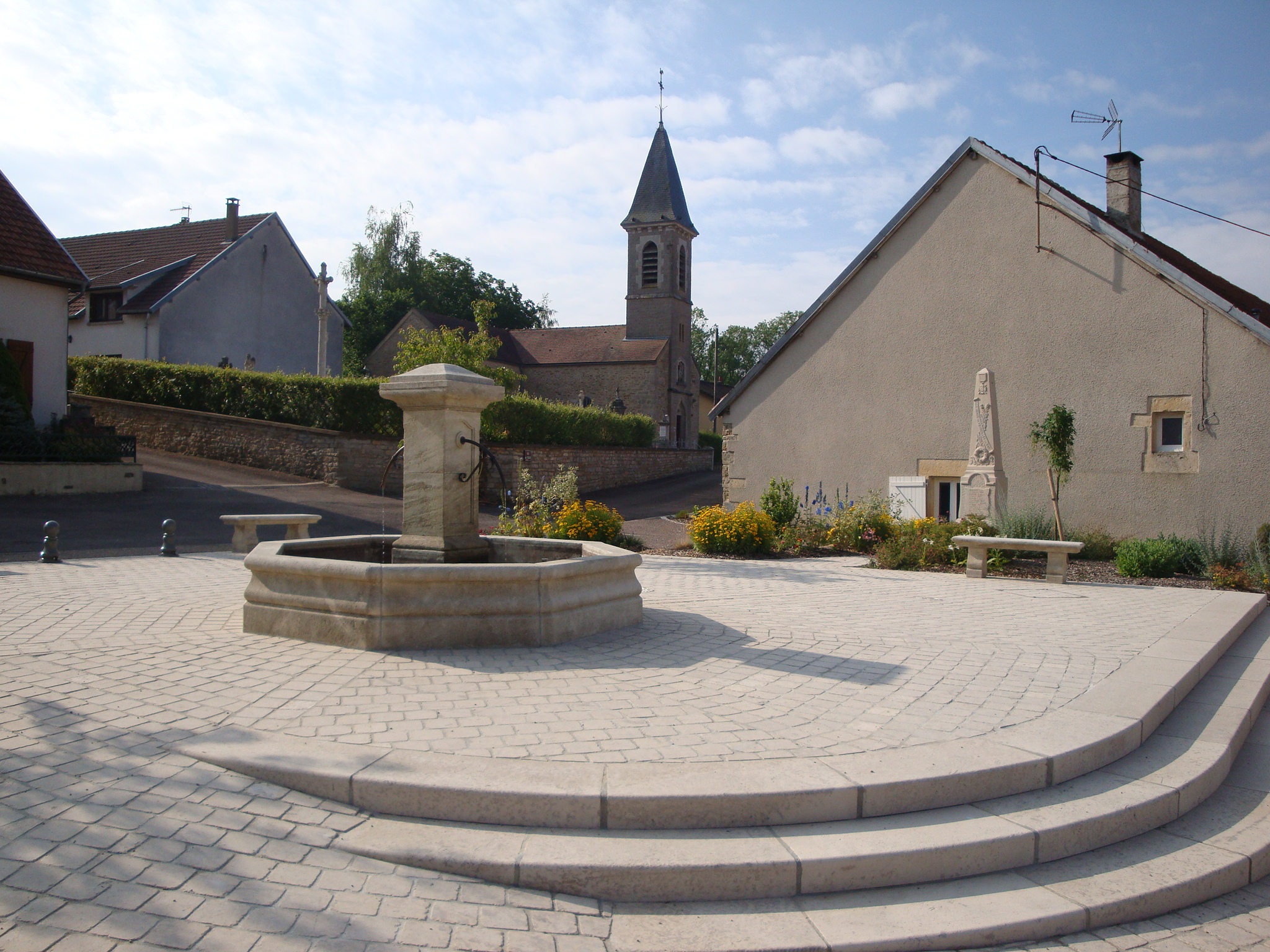 Place Saint-Martin de Verseilles-le-Bas